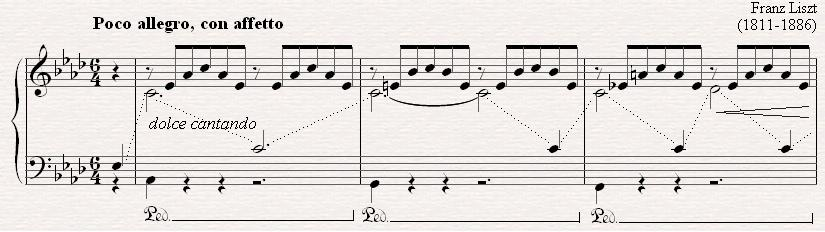 Liebestraume Nr. 3 von Franz Liszt. Liebestraum No. 3 by Franz Liszt. Liebestraum nº3 de Franz Liszt.